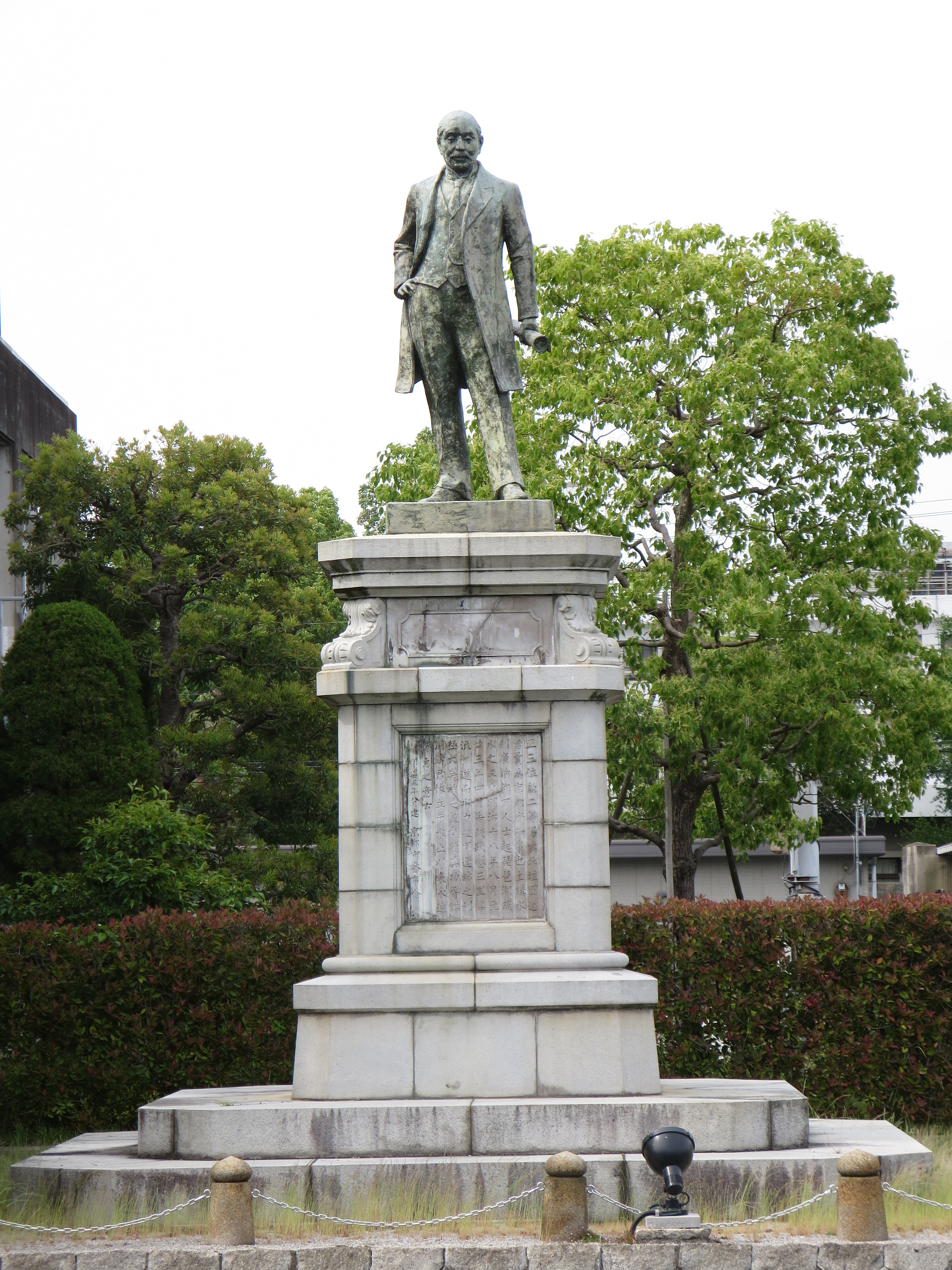 京都市左京区聖護院の夷川水力発電所近くにある像を公道上より撮影